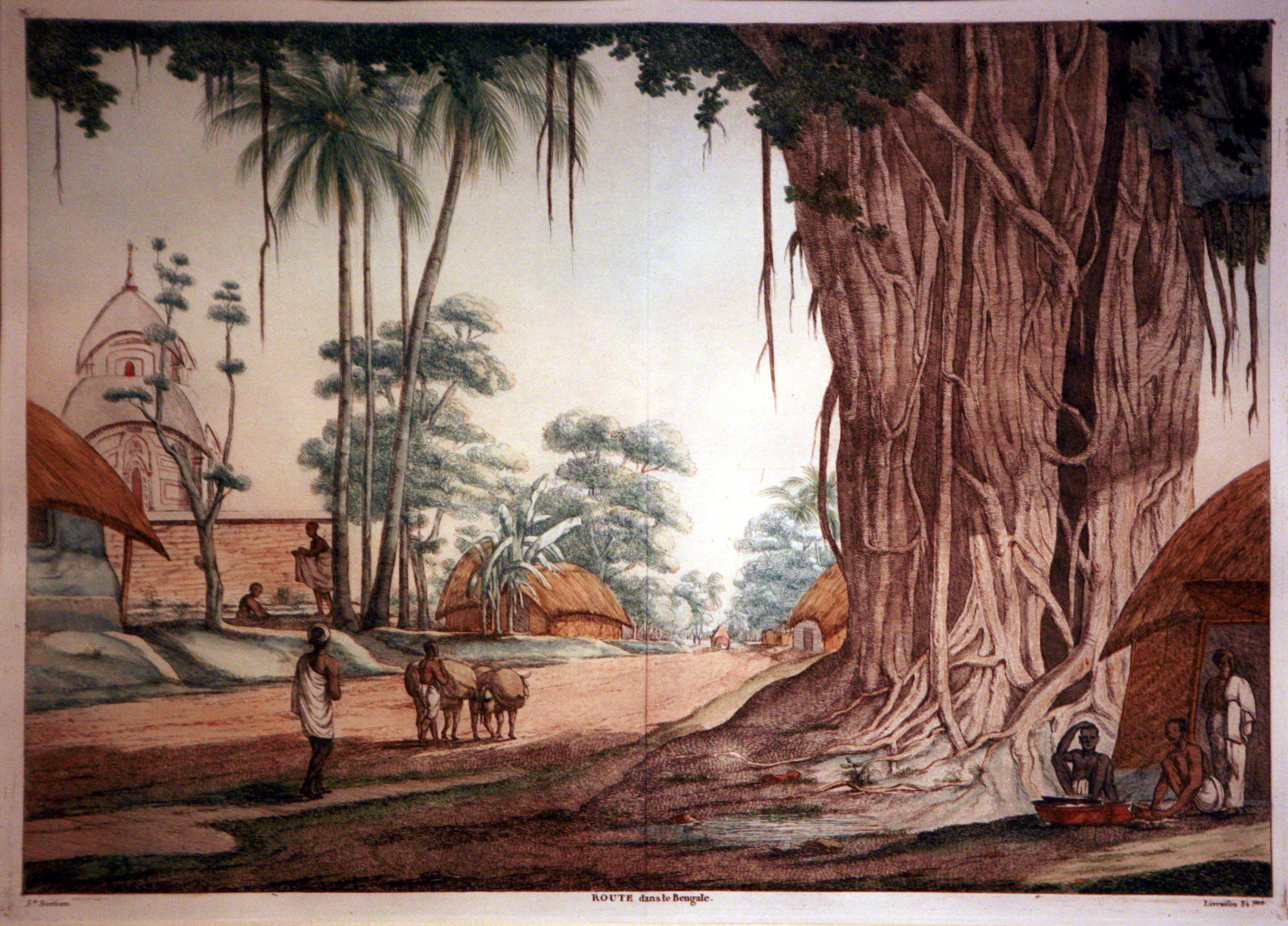 Road in Bengal